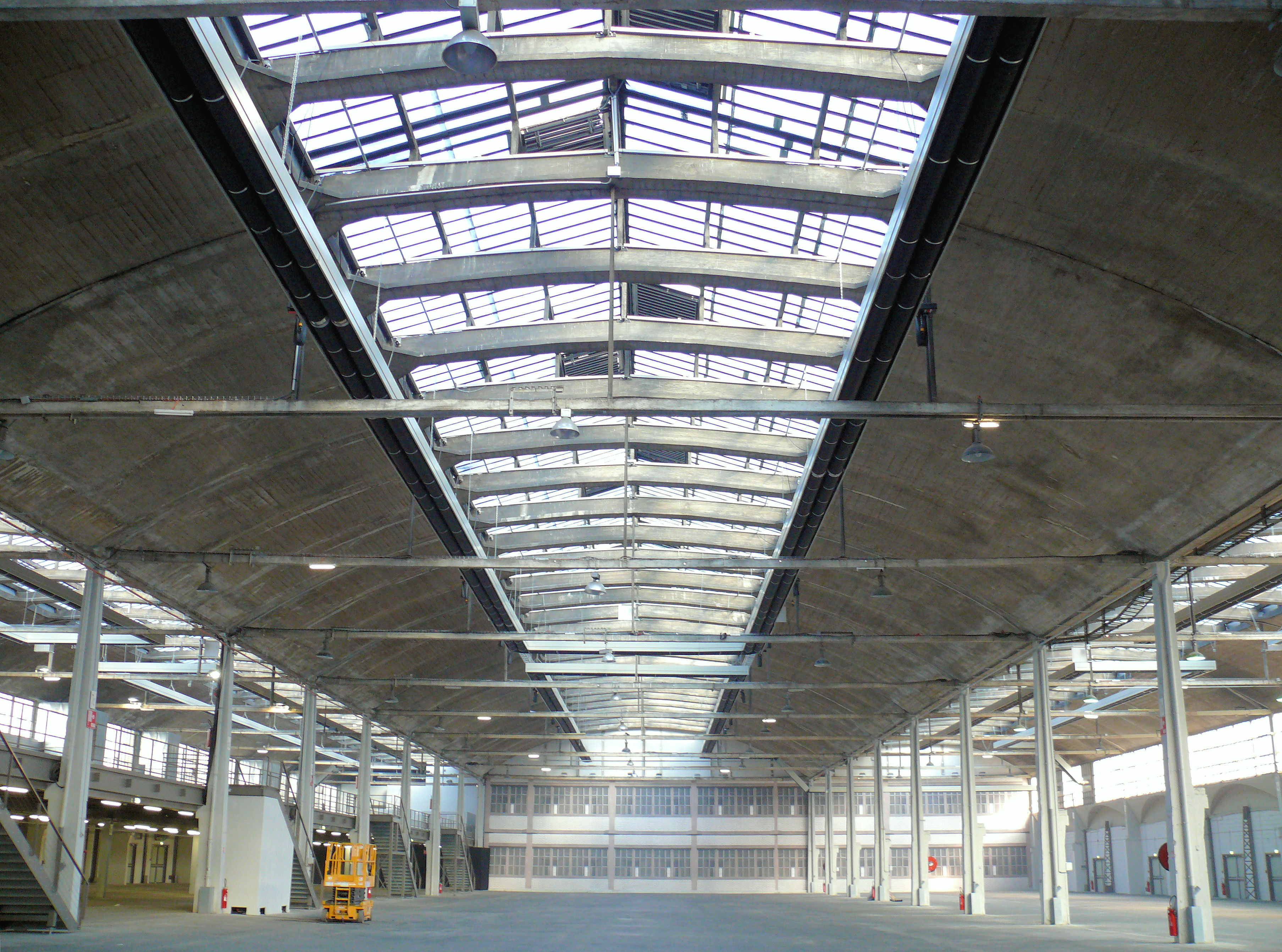 Paris 13e - Halle Freyssinet - Intérieur, la nef centrale et les deux nefs latérales